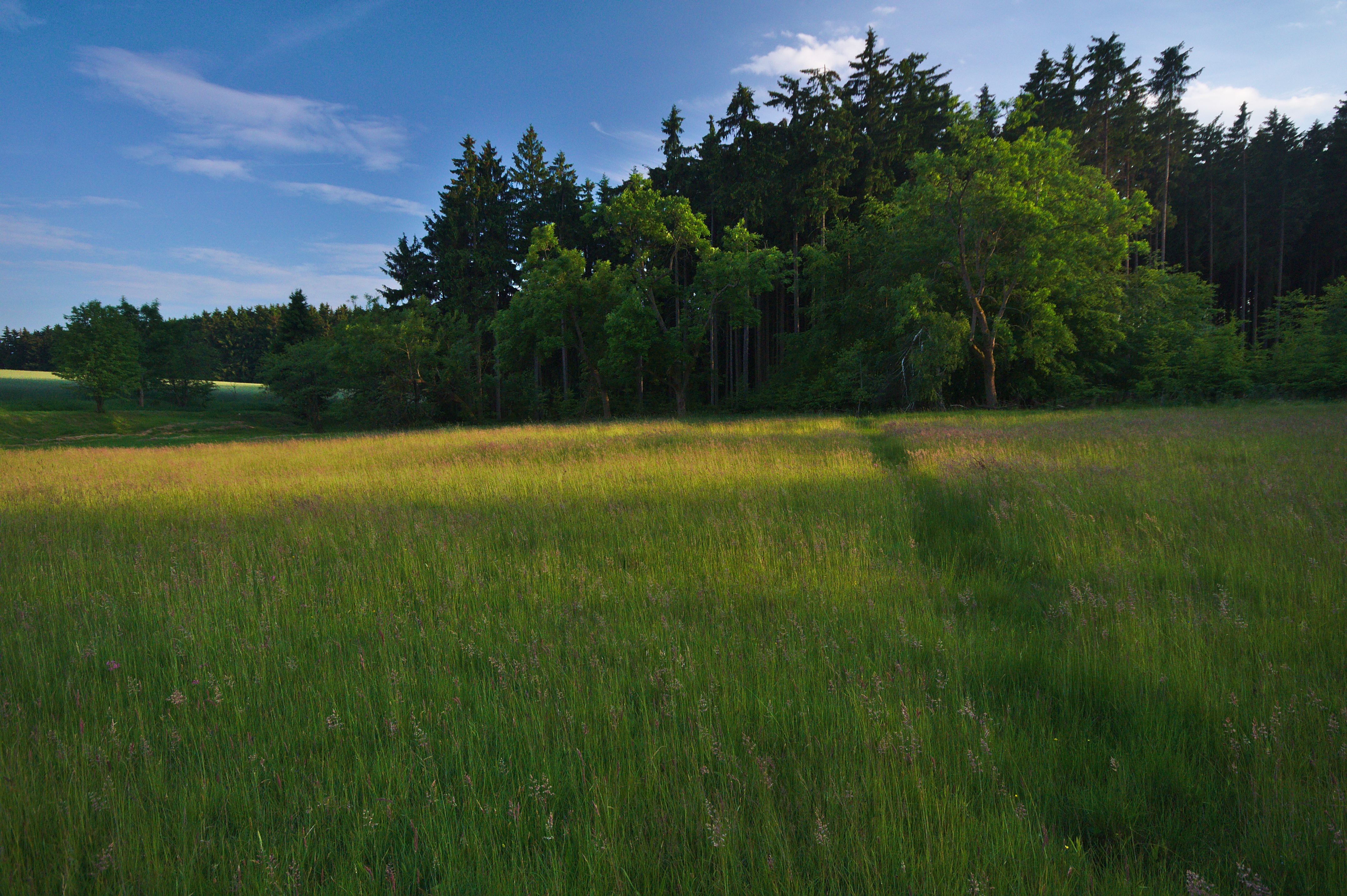 Přírodní památka Louky pod Skalami, okres Prostějov